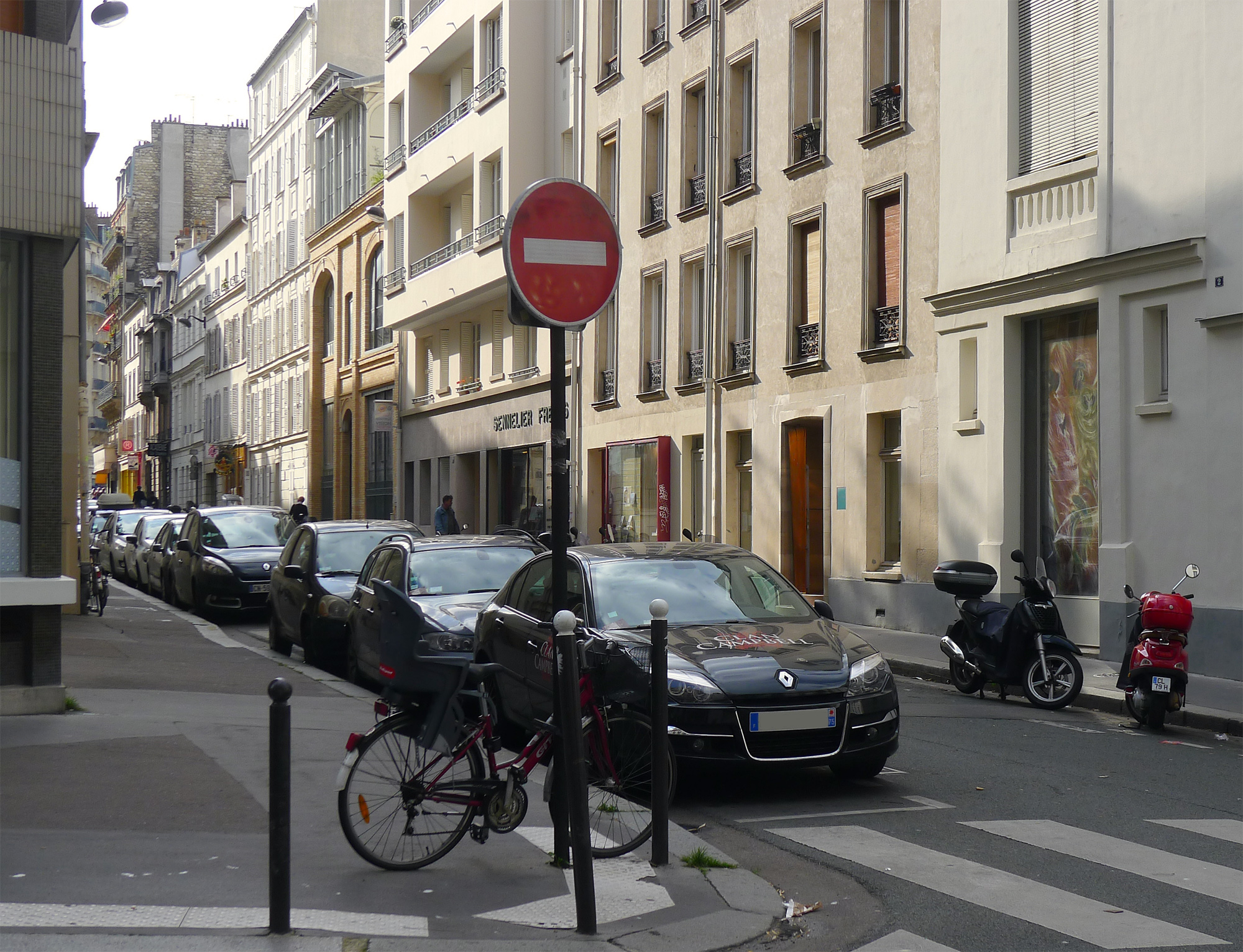 Rue de la Grande-Chaumière - Paris VI